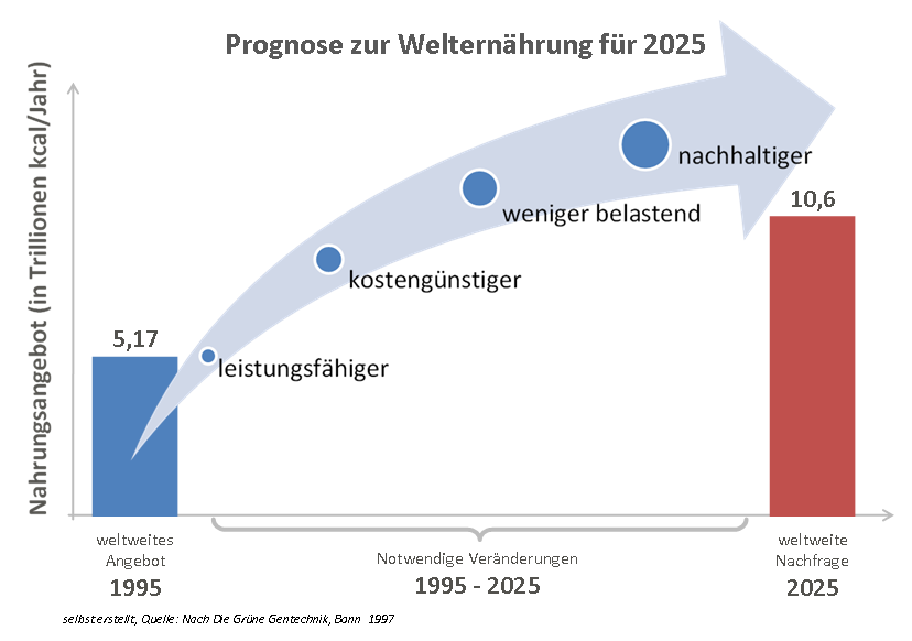 Prognose zur Welternährung für 2025, notwendige Schritte zur Sicherung der Ernährung